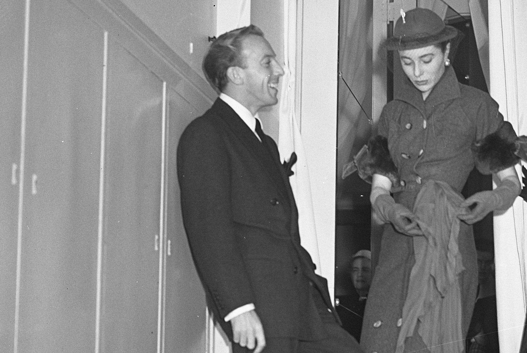 Collectie / Archief : Fotocollectie Anefo Reportage / Serie : [ onbekend ] Beschrijving : Modeshow van Jacques Fath (links) in Victoria hotel (cutted image) Datum : 17 november 1950 Locatie : Amsterdam, Noord-Holland Trefwoorden : mode, modeontwerpers, modeshows Persoonsnaam : Fath, Jacques Instellingsnaam : Victoria Hotel Fotograaf : Noske, J.D. / Anefo Auteursrechthebbende : Nationaal Archief Materiaalsoort : Glasnegatief Nummer archiefinventaris : bekijk toegang 2.24.01.09 Bestanddeelnummer : 904-2997 Reacties Geplaatst door Modefan op 27 februari 2016 - 16:20. Links mannequin Bettina (met een taille van 65 cm, zo staat in de krant te lezen) Geboren als Simone Micheline Bodin (1925-2015) NB. Zij was één van de best betaalde mannequins uit de jaren vijftig van de vorige eeuw.